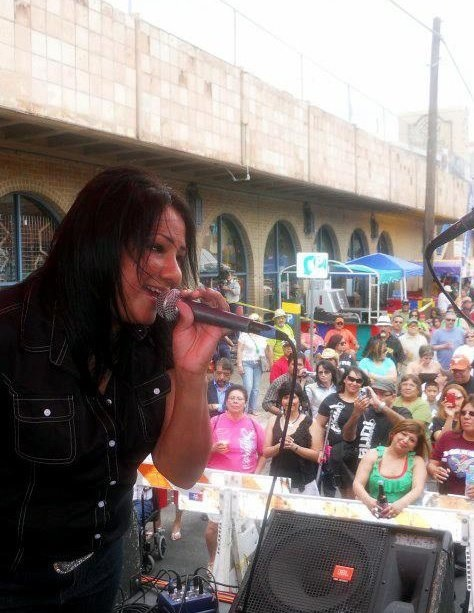 Audi, Tejano Fan Fair